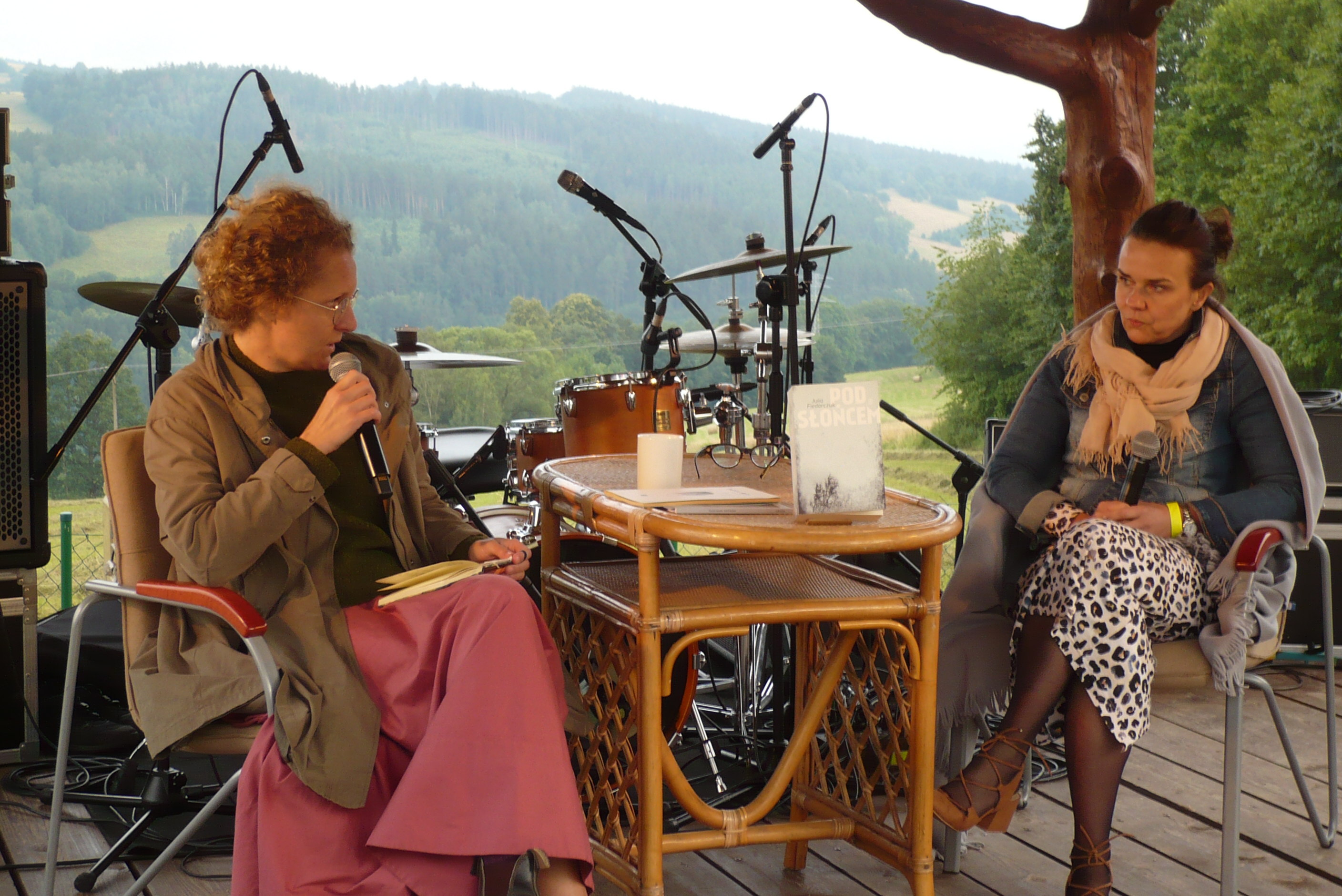 Justyna Czechowska i Julia Fiedorczuk, VI Festiwal Góry Literatury, 2020